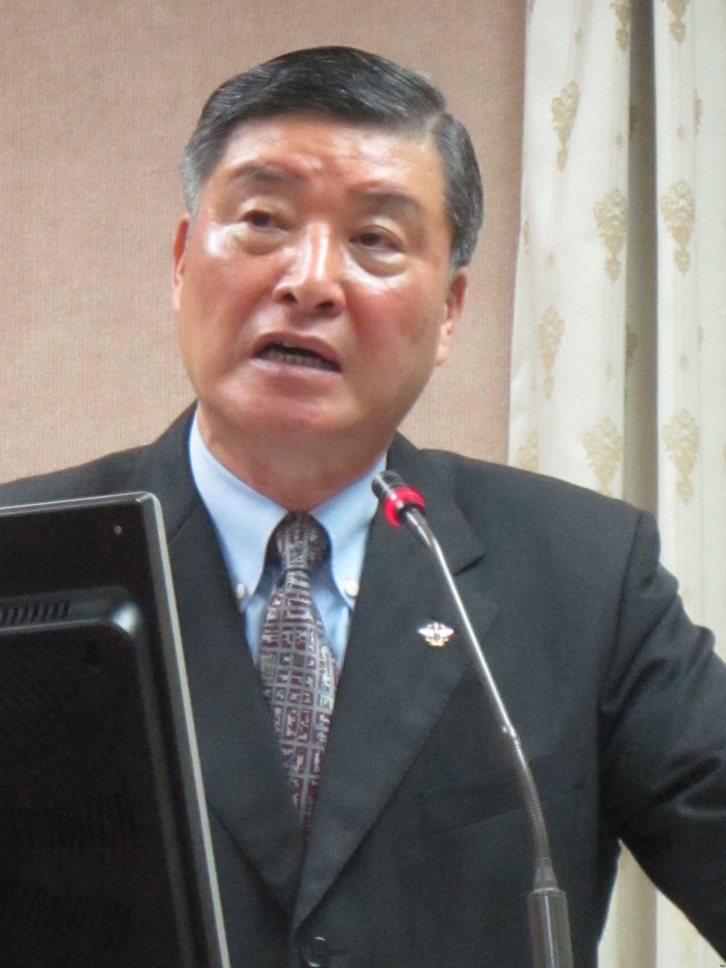 Kao Hua-chu